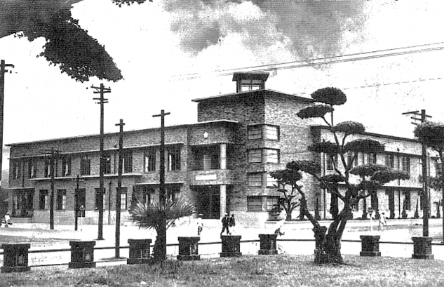 中文（台灣）: 1936興建，2000年10月拆除，今嘉義市警察局大樓